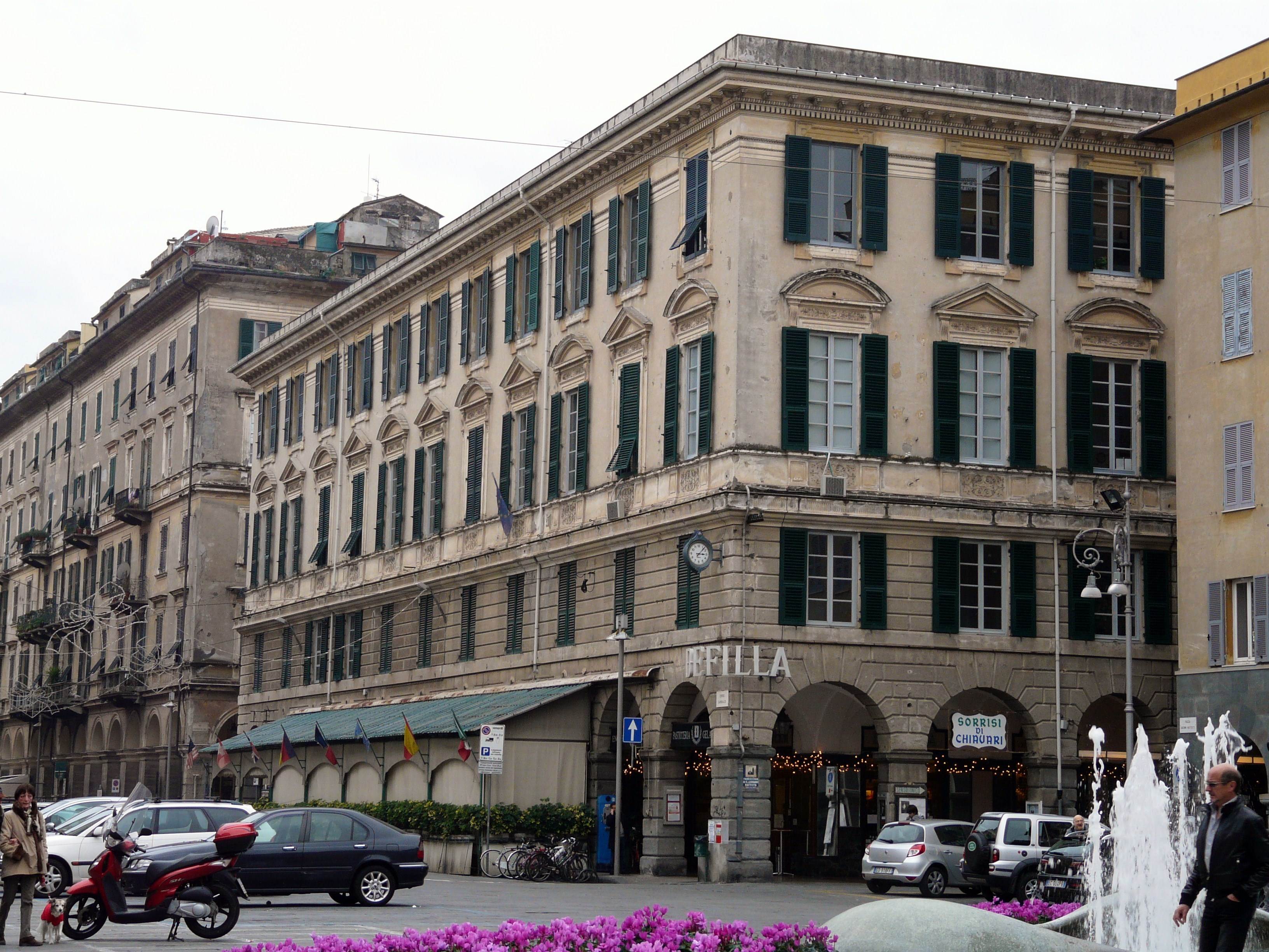 Caffè Defilla, Chiavari, Liguria, Italia